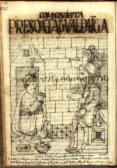 Atahuallpa prigioniero